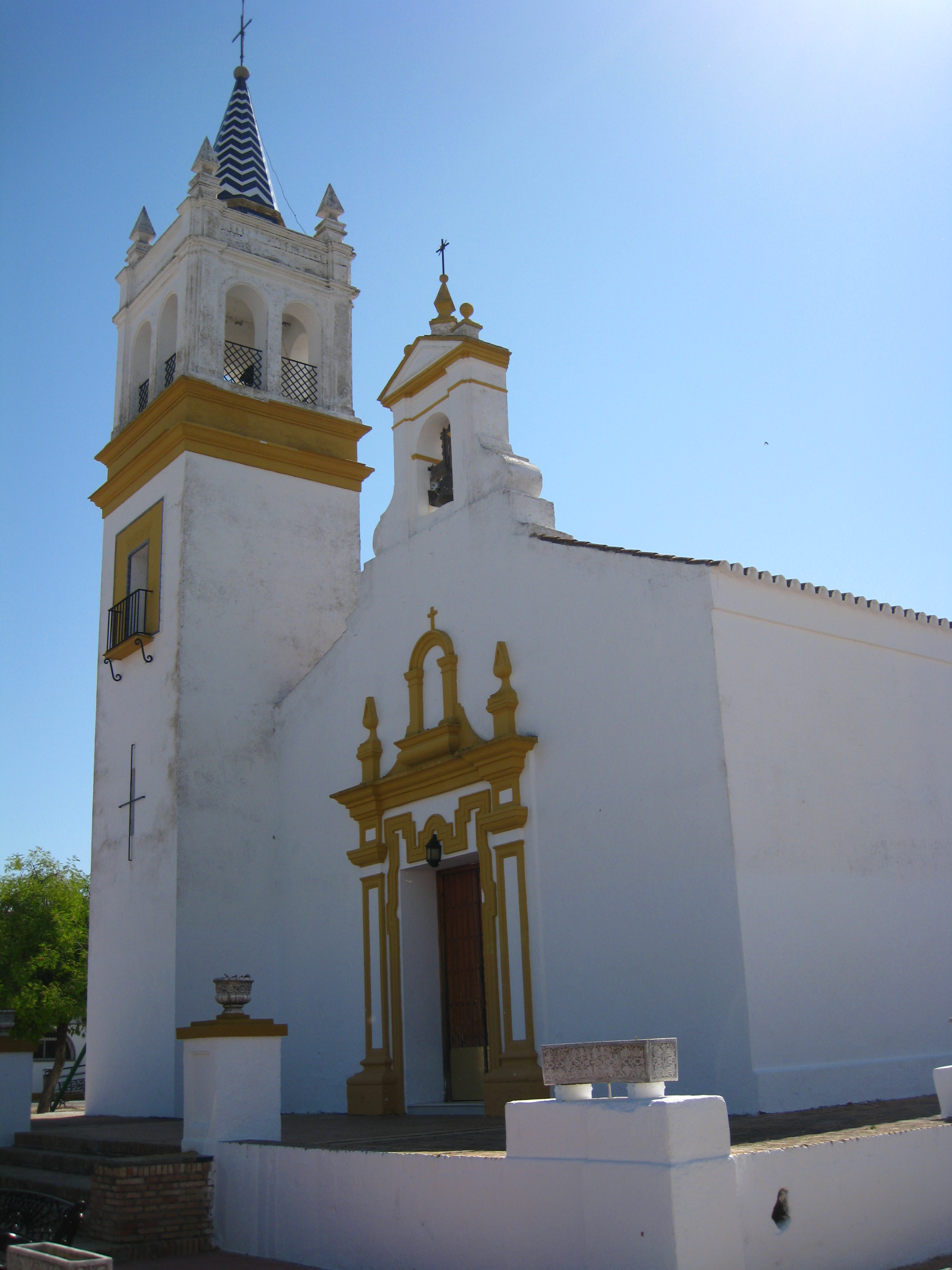 Vista exterior de la Iglesia Nuestra Señora de las Veredas, de Guadalema de los Quintero (Sevilla, España)